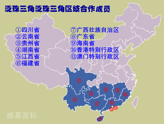 泛珠三角区域合作与发展论坛成员，绘制人：竹围墙。